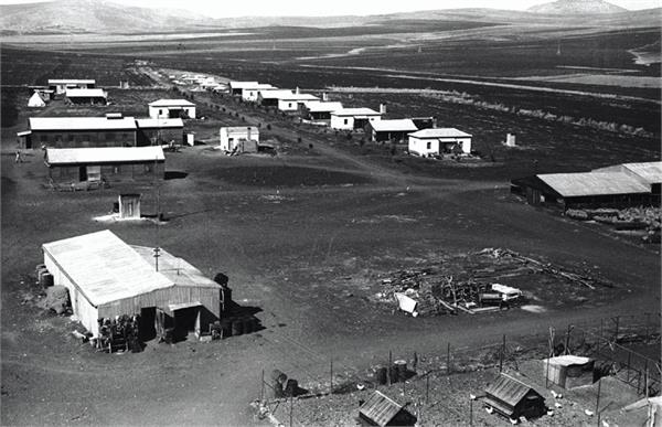 בני ברית - במושב